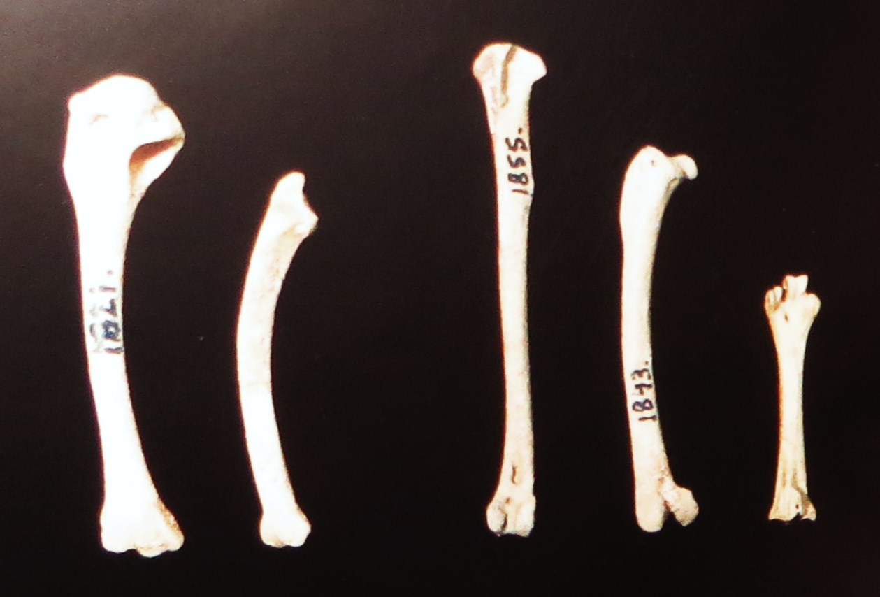 Fossil of Coturnix gomerae, an extinct bird- Took the picture at Museo de la Naturaleza y el Hombre - Tenerife